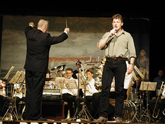 Piter Wilkens mei Fryske Jeugd Brassband op Helgolân, 2001.